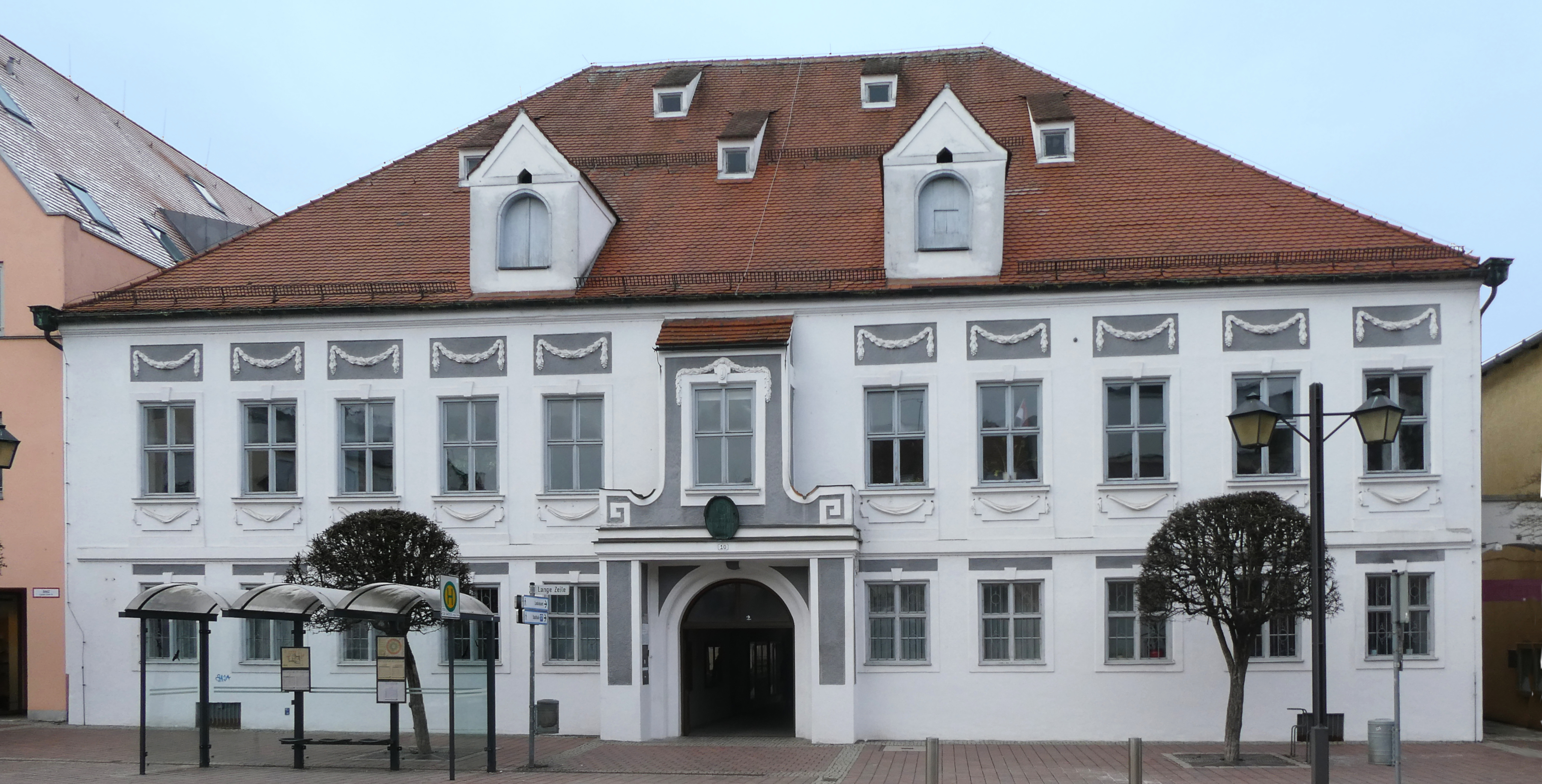 Erding, Lange Zeile 10 (Palais Widnmann), von Osten gesehen.